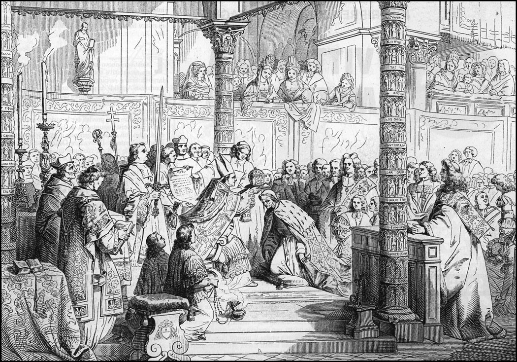 Papa Alessandro VIII fece recapitare al doge Francesco Morosini due simboli che la Santa Sede consegnava per tradizione agli eroi che avevano combattuto gloriosamente in difesa della religio¬ne cristiana: il pileo e lo stocco ovvero un copricapo ricca¬mente decorato e una specie di spada entrambi benedetti dallo stesso pontefice. Per questa occasione la Basilica di S.Marco venne magnificamente addobbata a festa il 7 maggio del 1690. Il Morosini usci allora da Palazzo Ducale accompagnato dai Senatori e dai Magistrati e si recò nella chiesa dove si sarebbe svolta la solenne cerimonia.